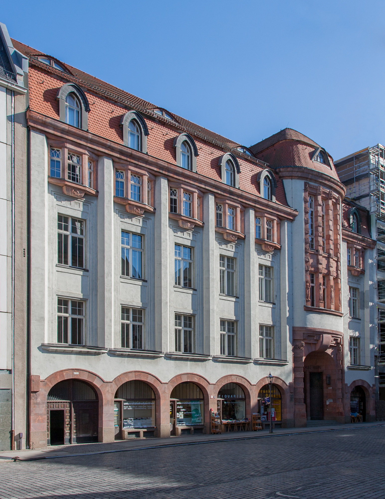 Geschwister-Scholl-Haus, erbaut 1908–1910.